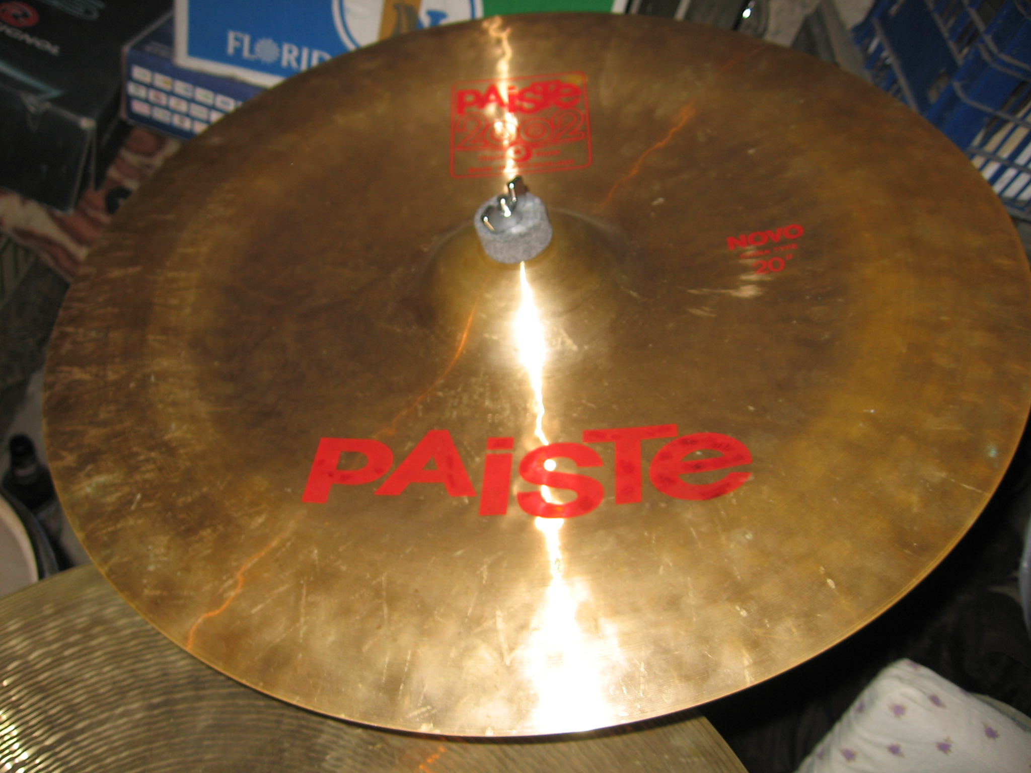 Paiste 20" Novo china z serii "2002"